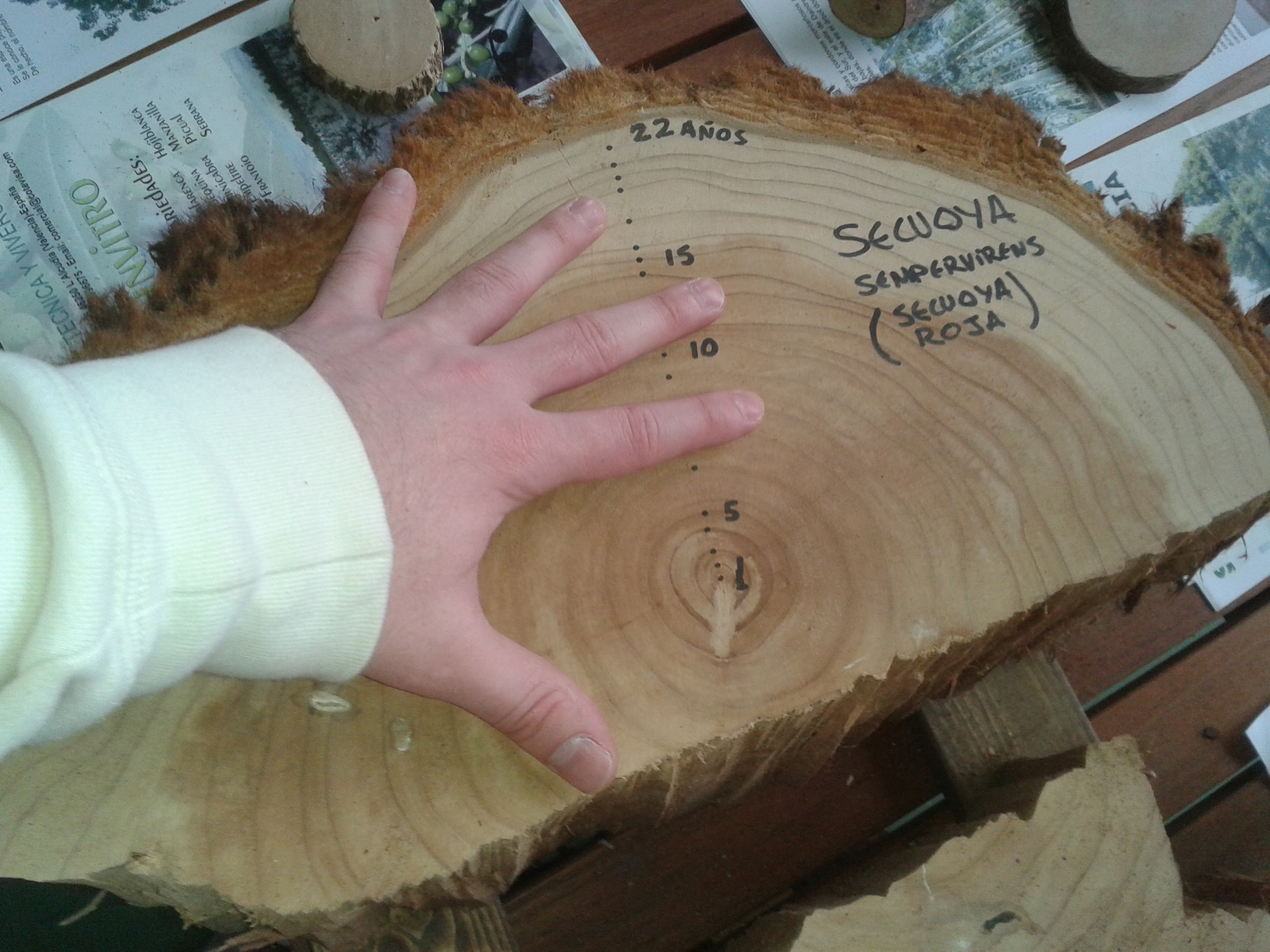 Detalle de toro de secuoia cortado aos 22 anos. Vese o núcleo de madeira dura vermella. Plantación experimental de Fontao, Foz.